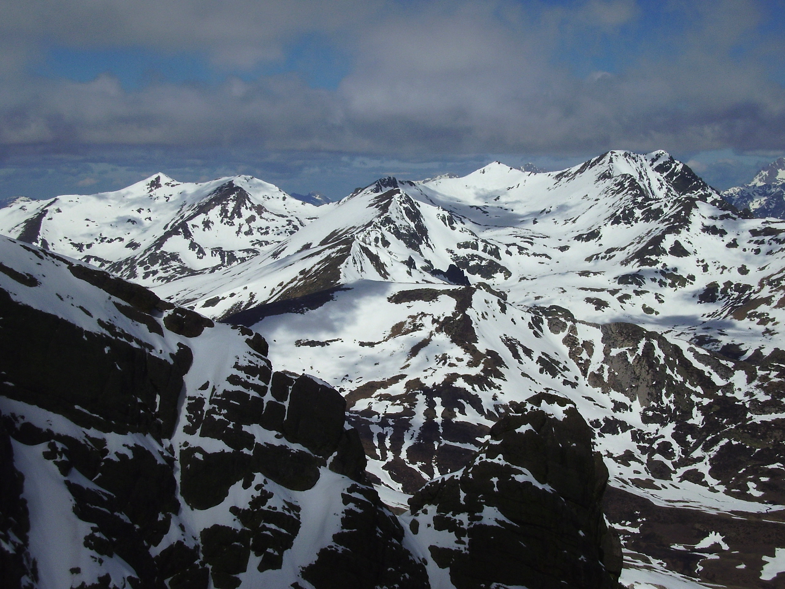 Vista desde la cara norte del Curavacas. Se puede ver Pico Cuartas, Mojón de Tres Provincias y Peña Prieta.